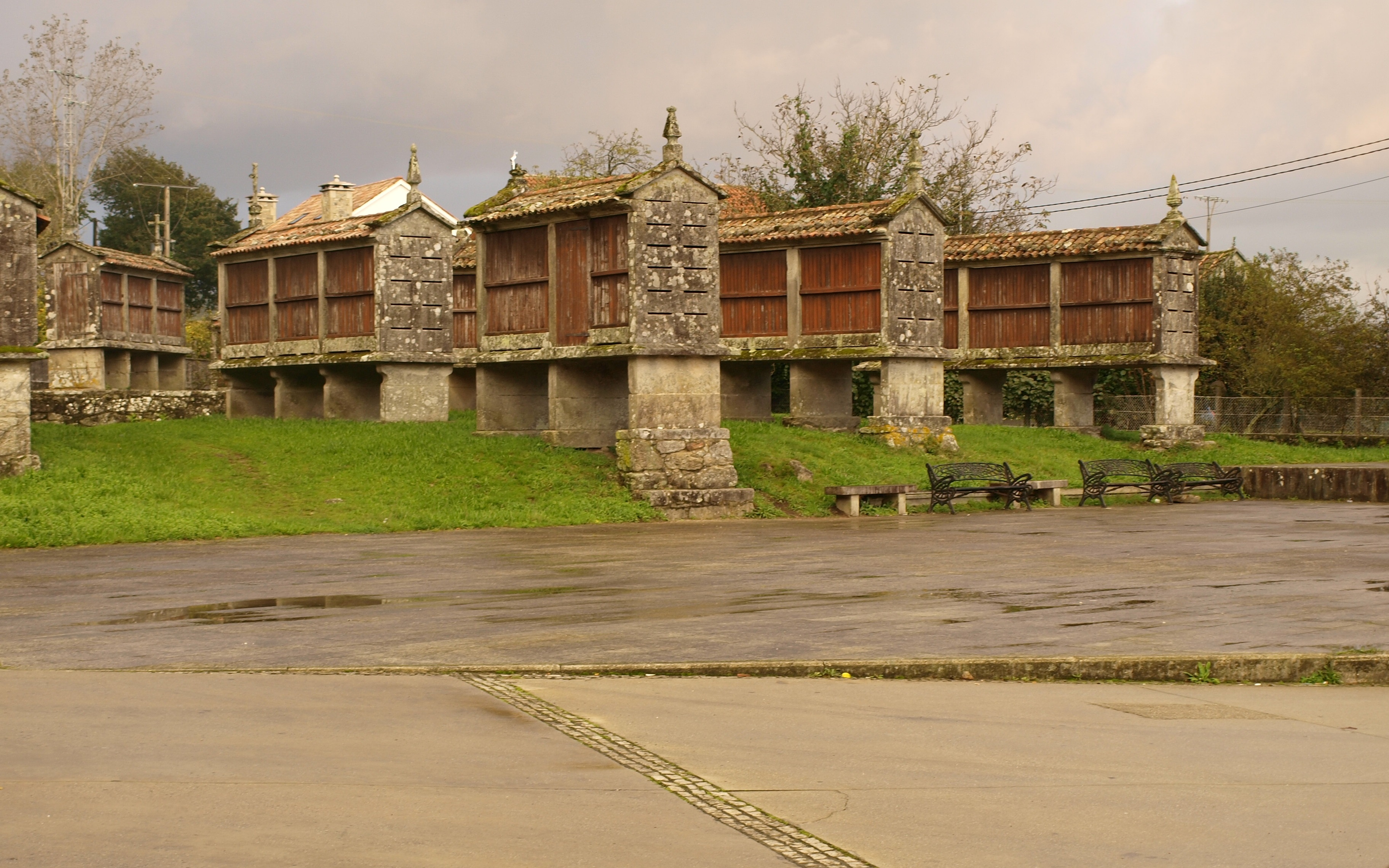 Hórreos da Lavandeira na aldea de Imo, Dodro